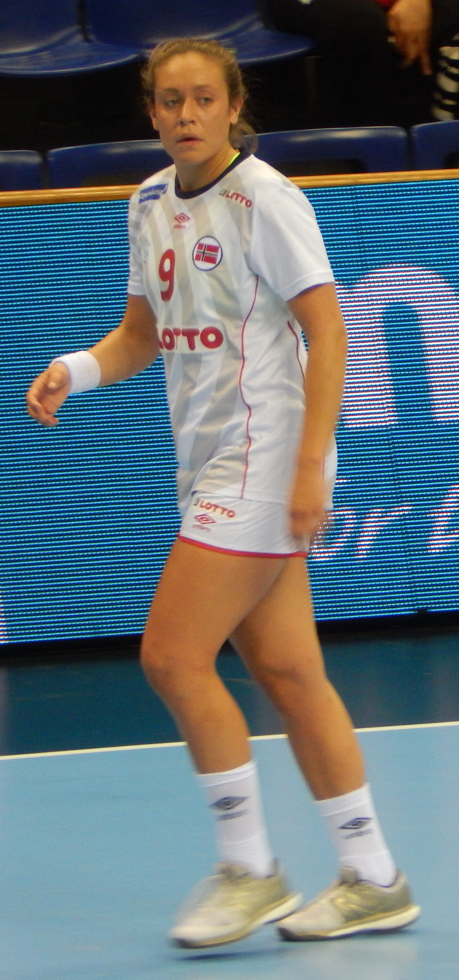 Норвежская гандболистка Матильде Ривас Тофт, чемпионат мира по гандболу среди девушек до 20 лет. Групповой этап, группа A. Матч Венгрия - Норвегия